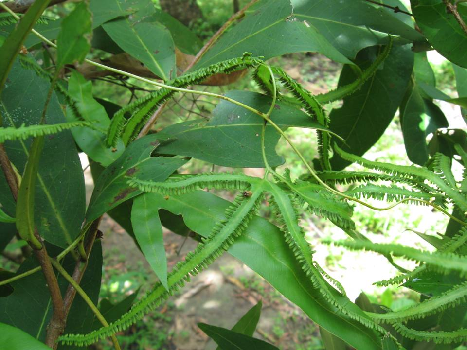 Basa Jawa: Lygodium circinnatum fertil leaf, from Gua Kebon, Yogyakarta, Indonesia